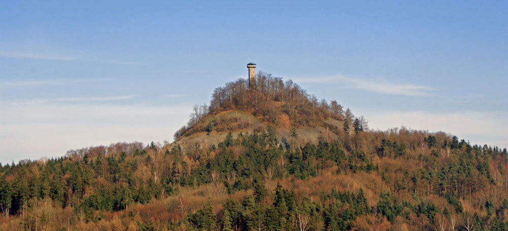 Der Rauhe Kulm, vom kleinen Kulm aus gesehen